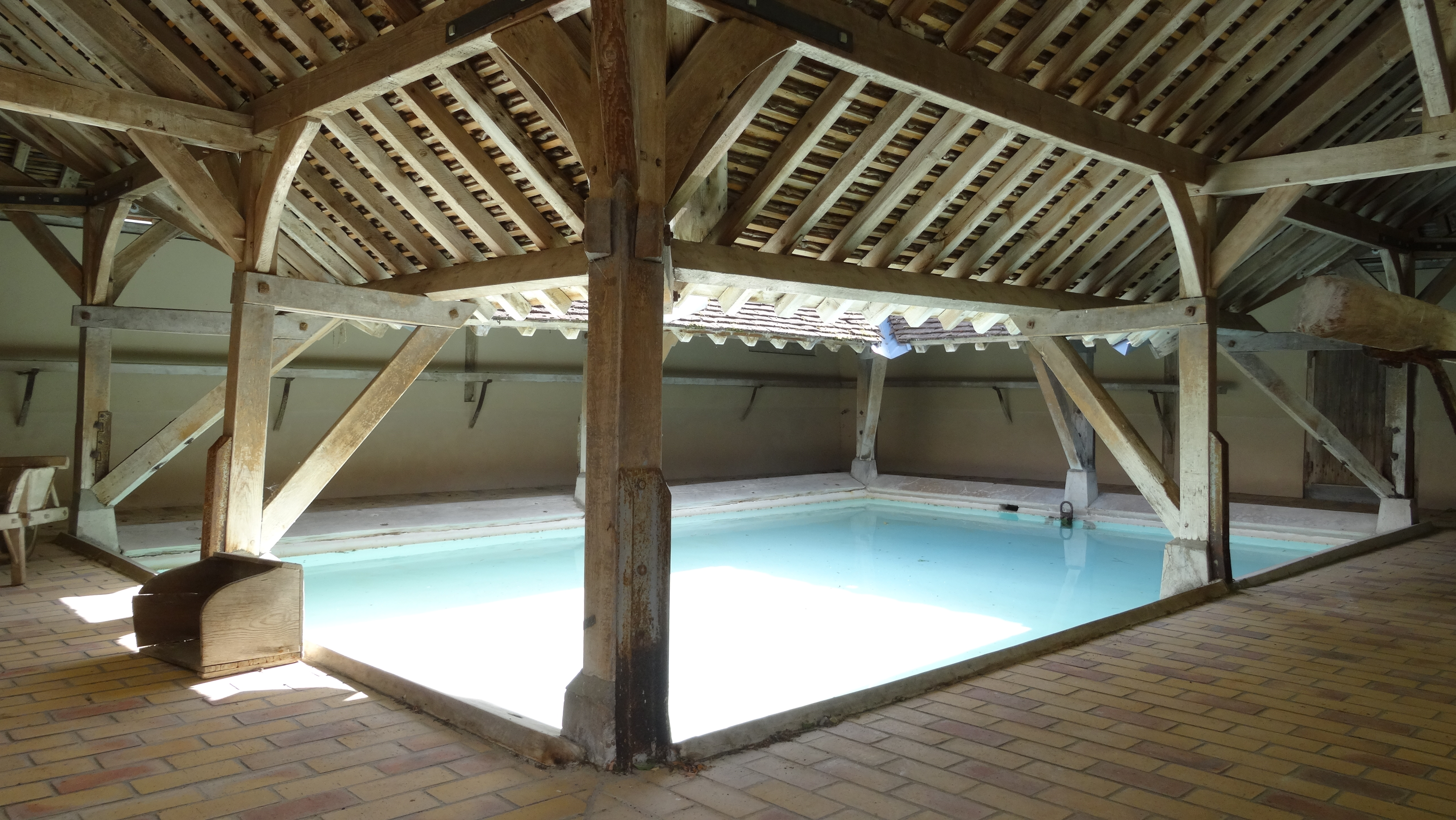 Lavoir à Échouboulains. (Seine-et-Marne, région Île-de-France).